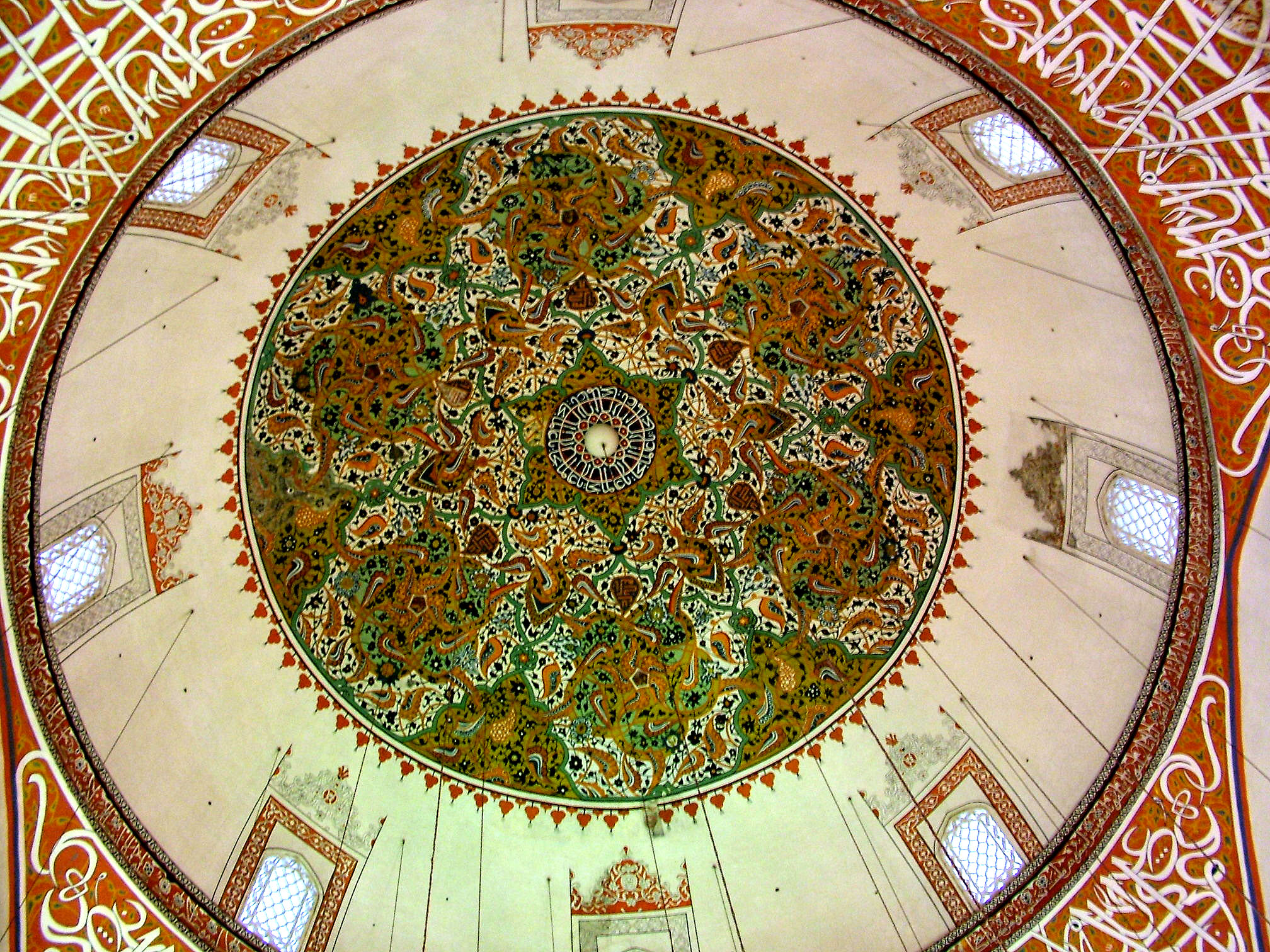 Mevlana Múzeum: központi kupolatér (Konya, Törökország)